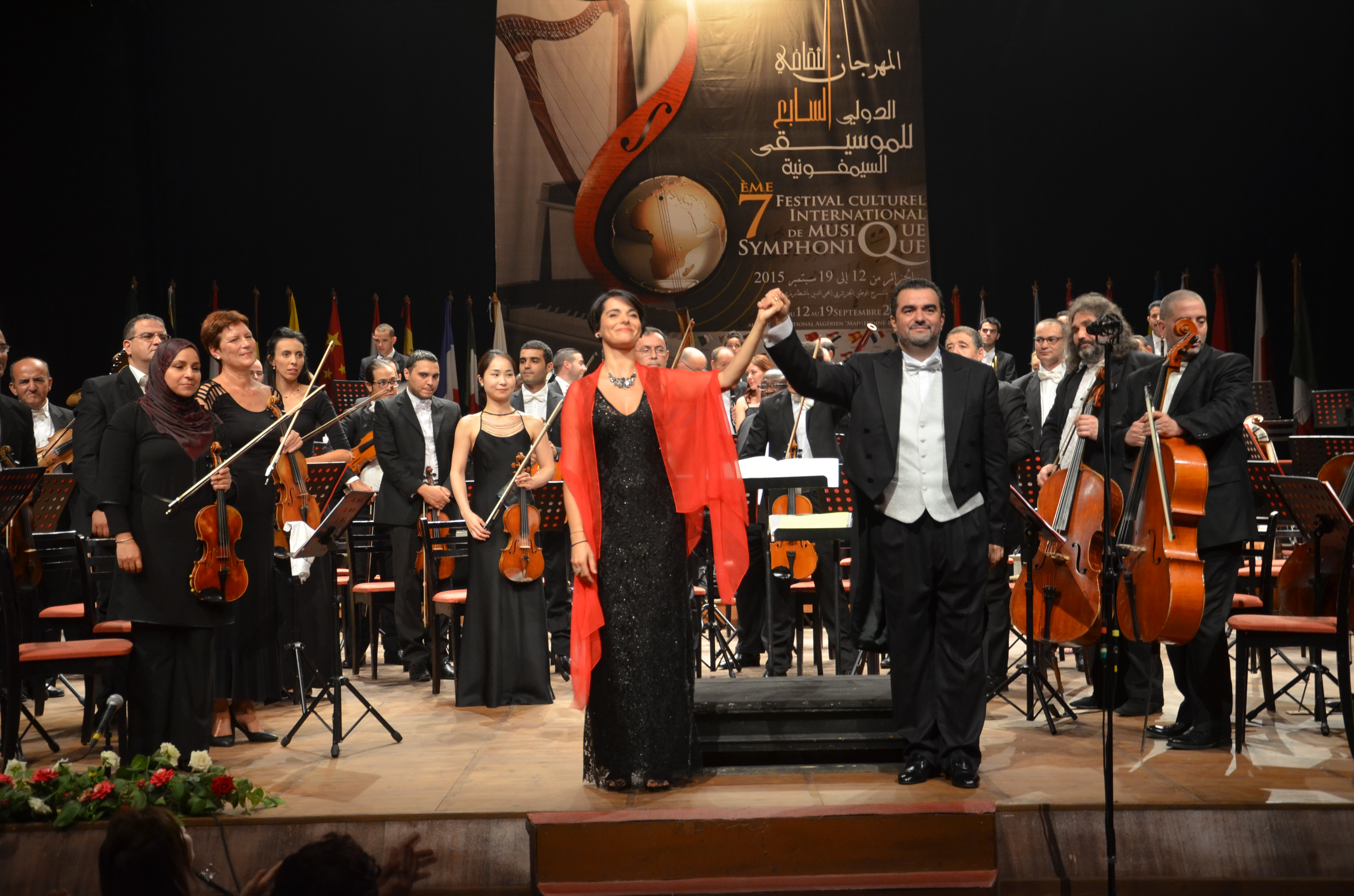 Festival international de musique symphonique Alger 2015 This is an image of music and dance from Algeria